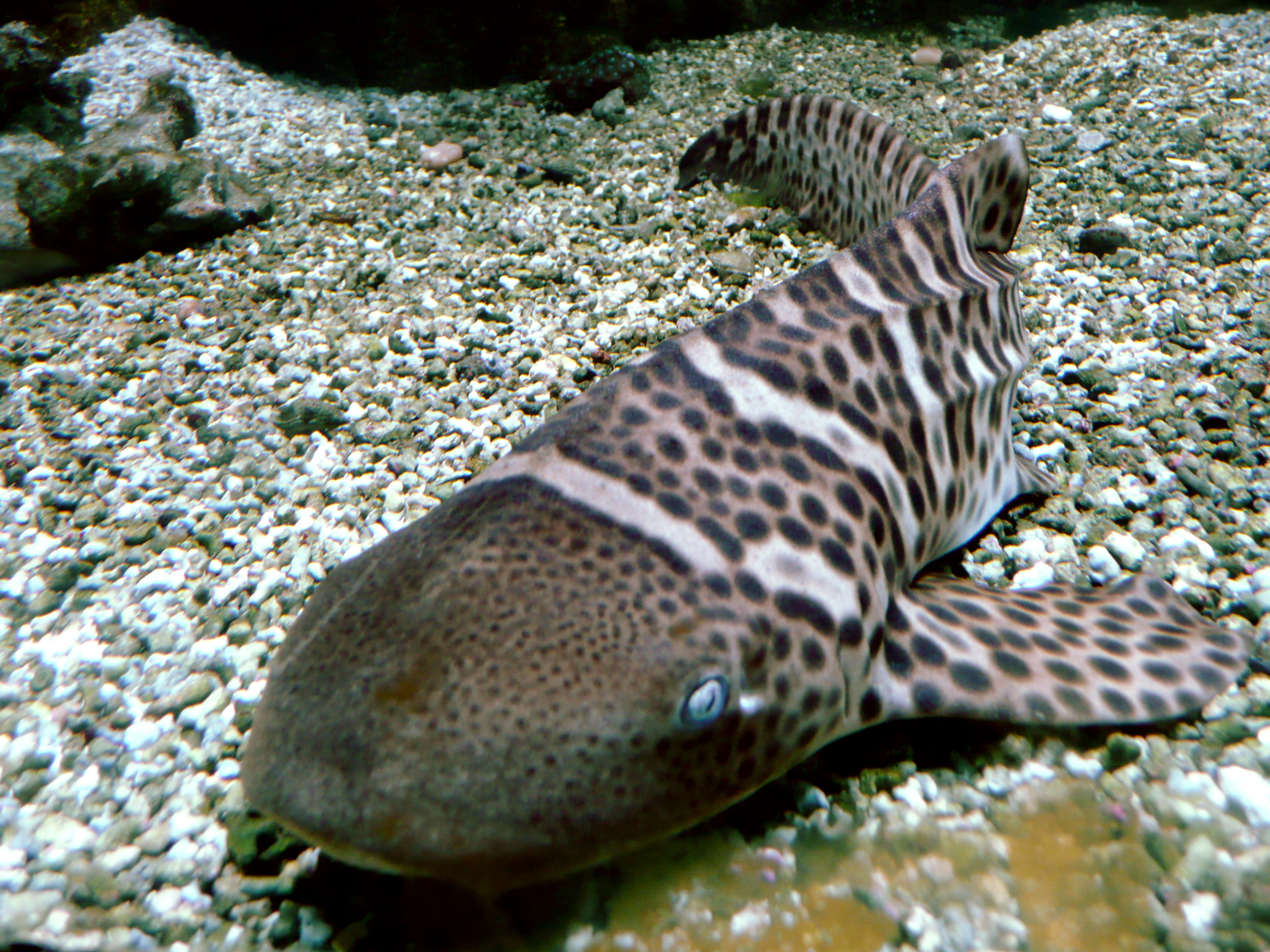 Stegostoma fasciatum in Aquarium tropical du Palais de la Porte Dorée